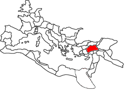 カッパドキア属州の位置.